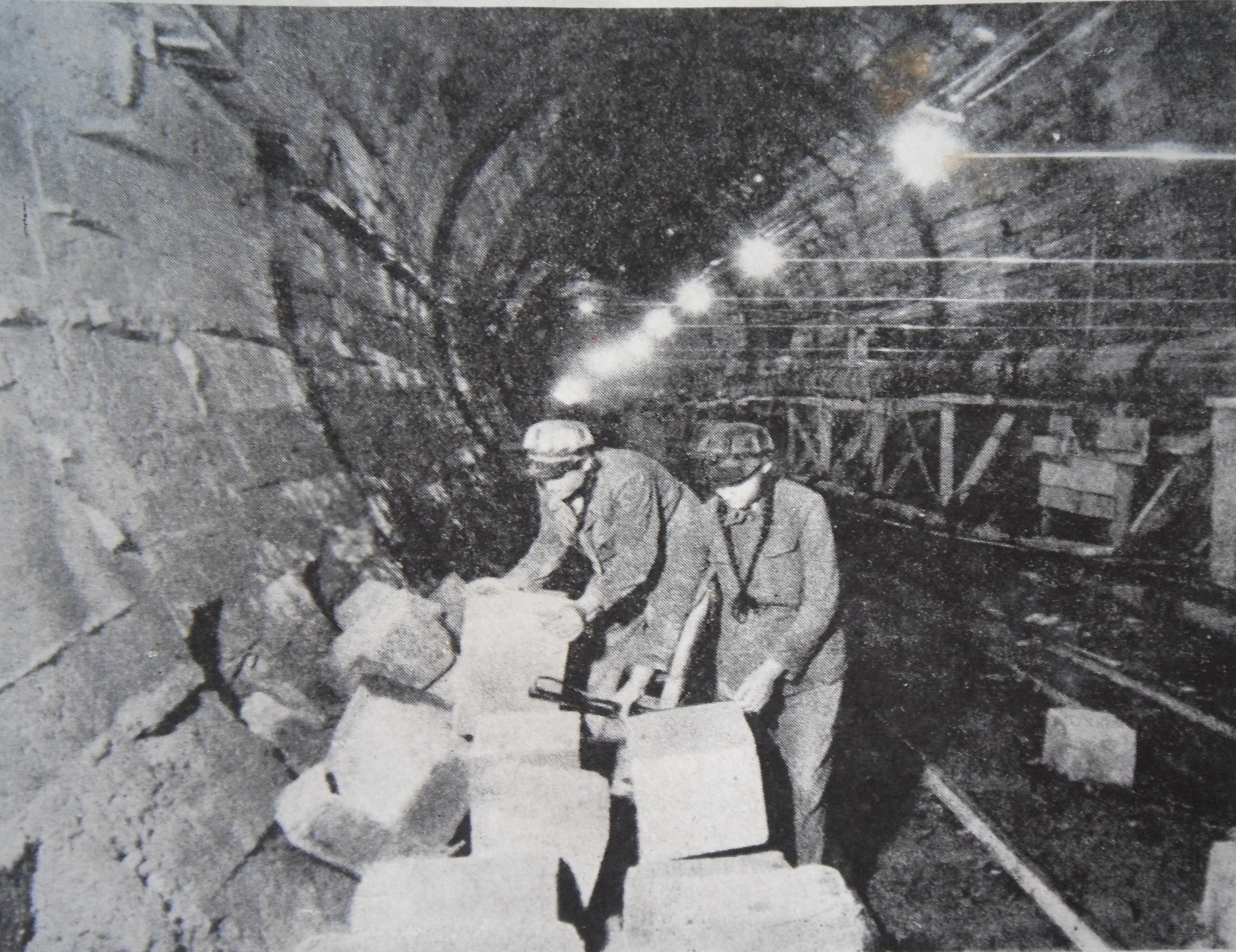 Construcția tunelului de aducțiune a apei din lacul Bicaz spre hidrocentrala de la Stejarul. Luarea probelor de beton.